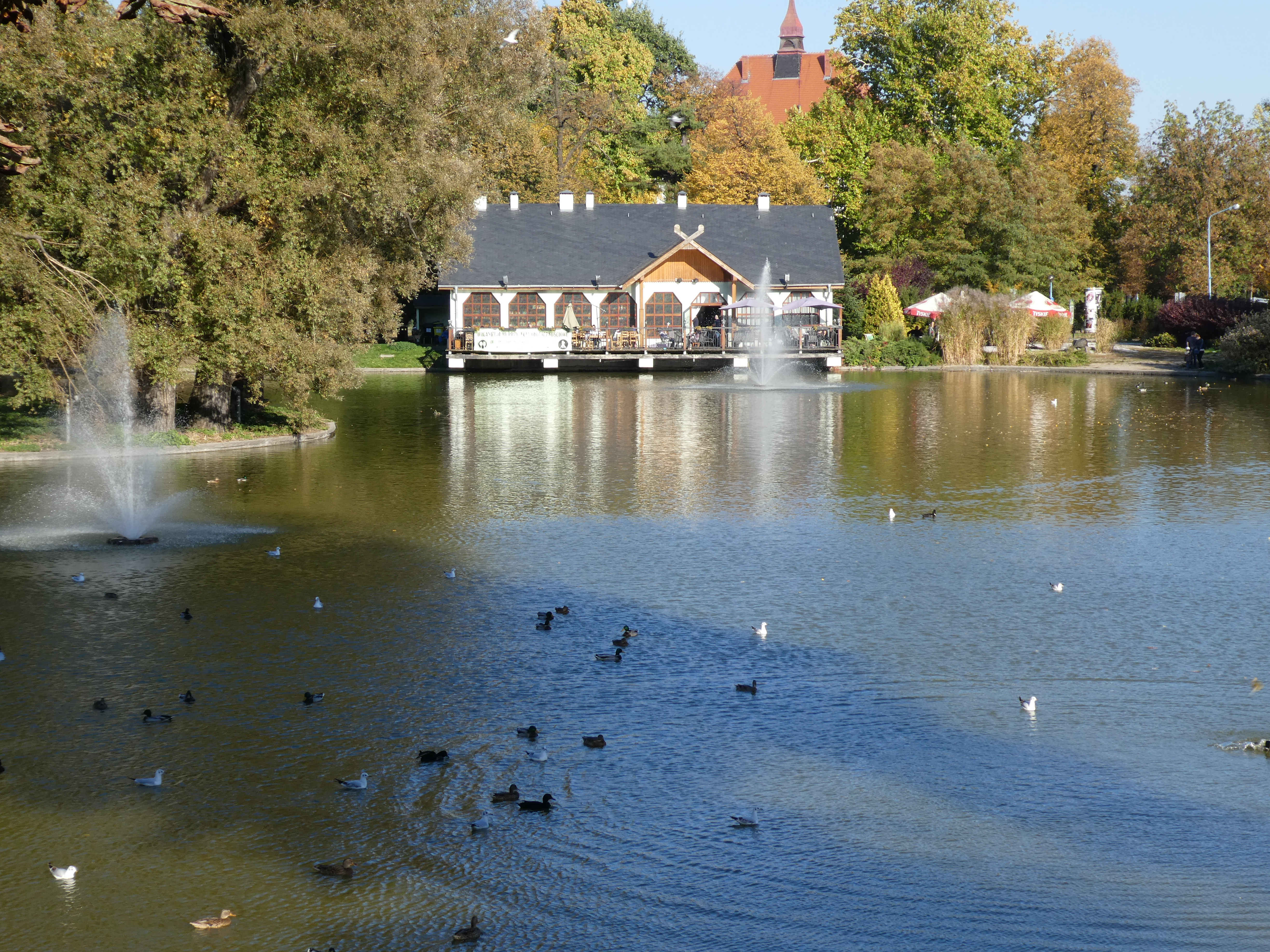 Kozio Staw w Legnicy wraz z budynkiem "Wenecji" zlokalizowany przy centrum miasta.